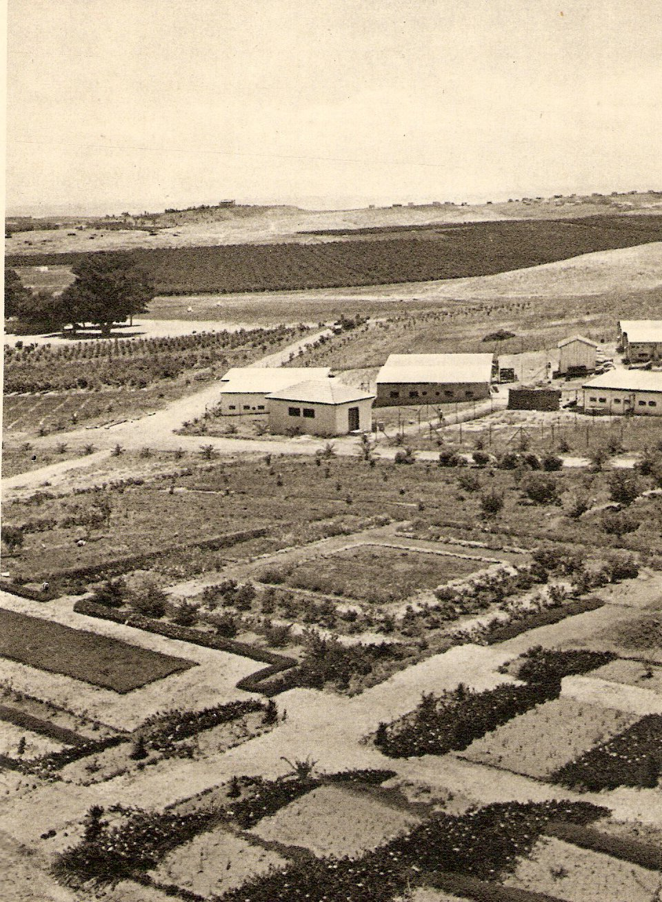 Ness Ziona